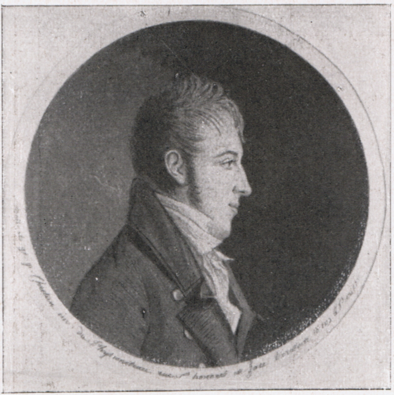 Johann Heinrich Gaedertz (* 5. November 1781; † 5. Juli 1855), Lübecker Senator. Jugendbild.